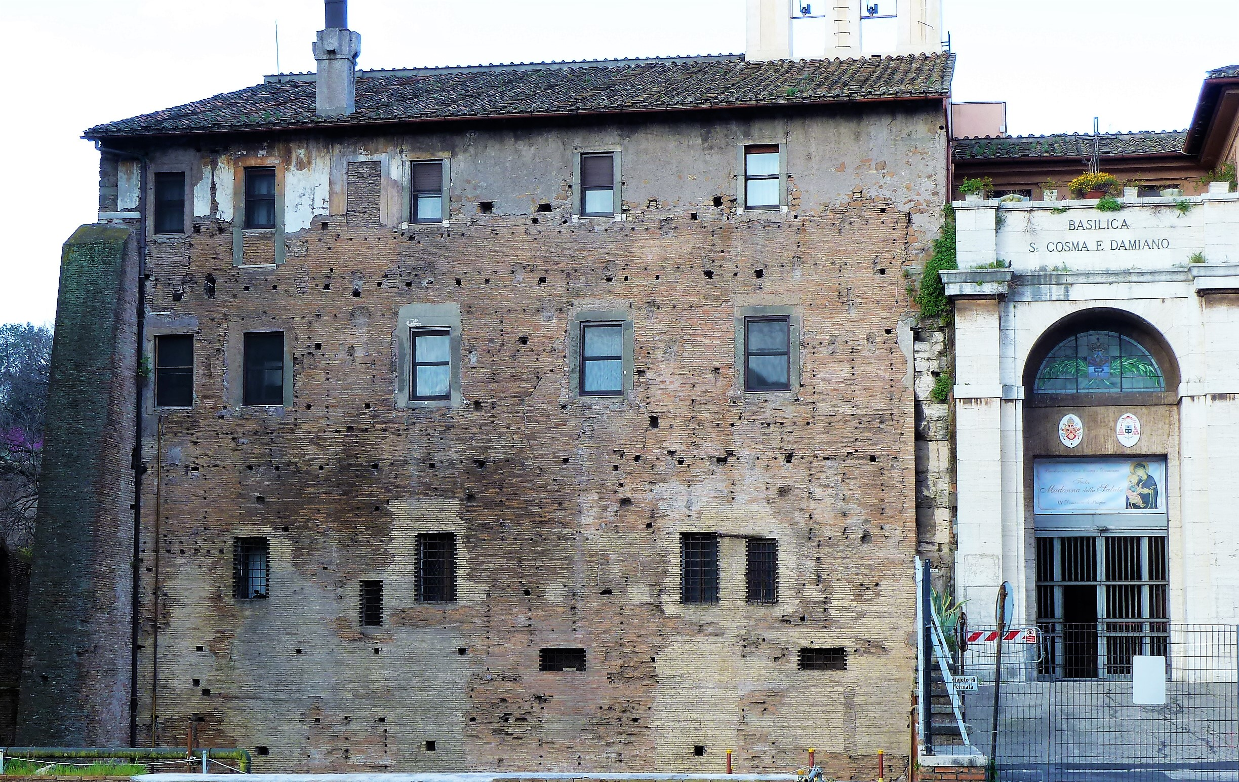 entrata verso il cortile, accanto del muro al quale era attaccata la Forma Urbis Romae